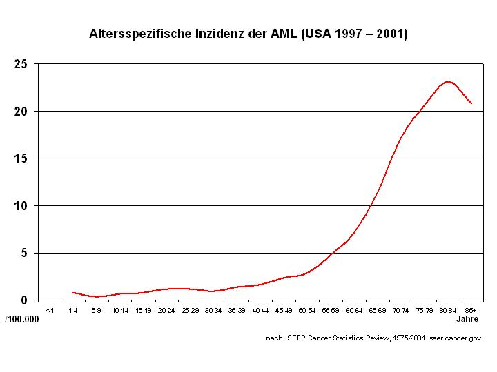 Alterspezifische Inzidenz AML